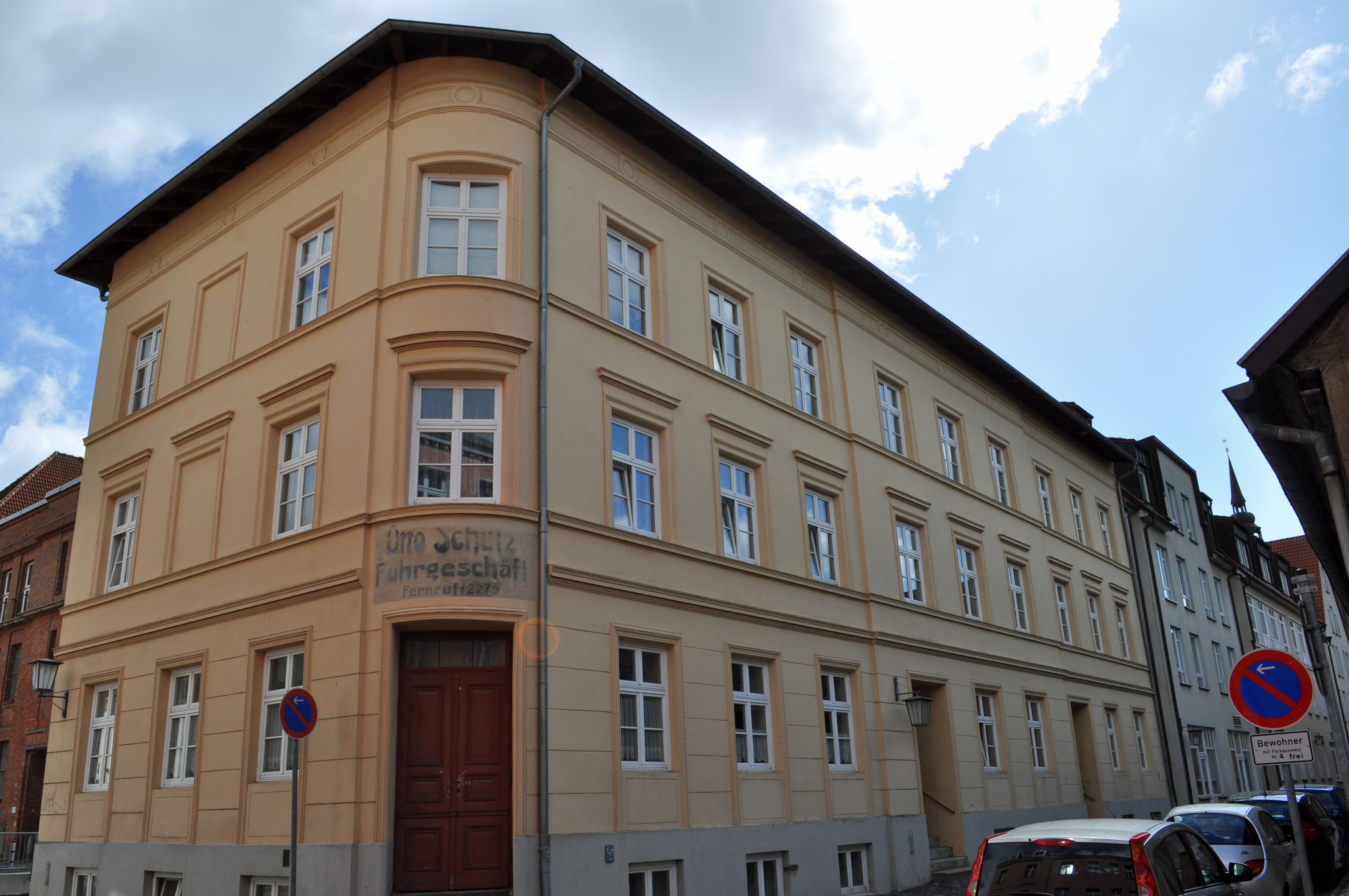 Gebäude in Stralsund, siehe Dateiname